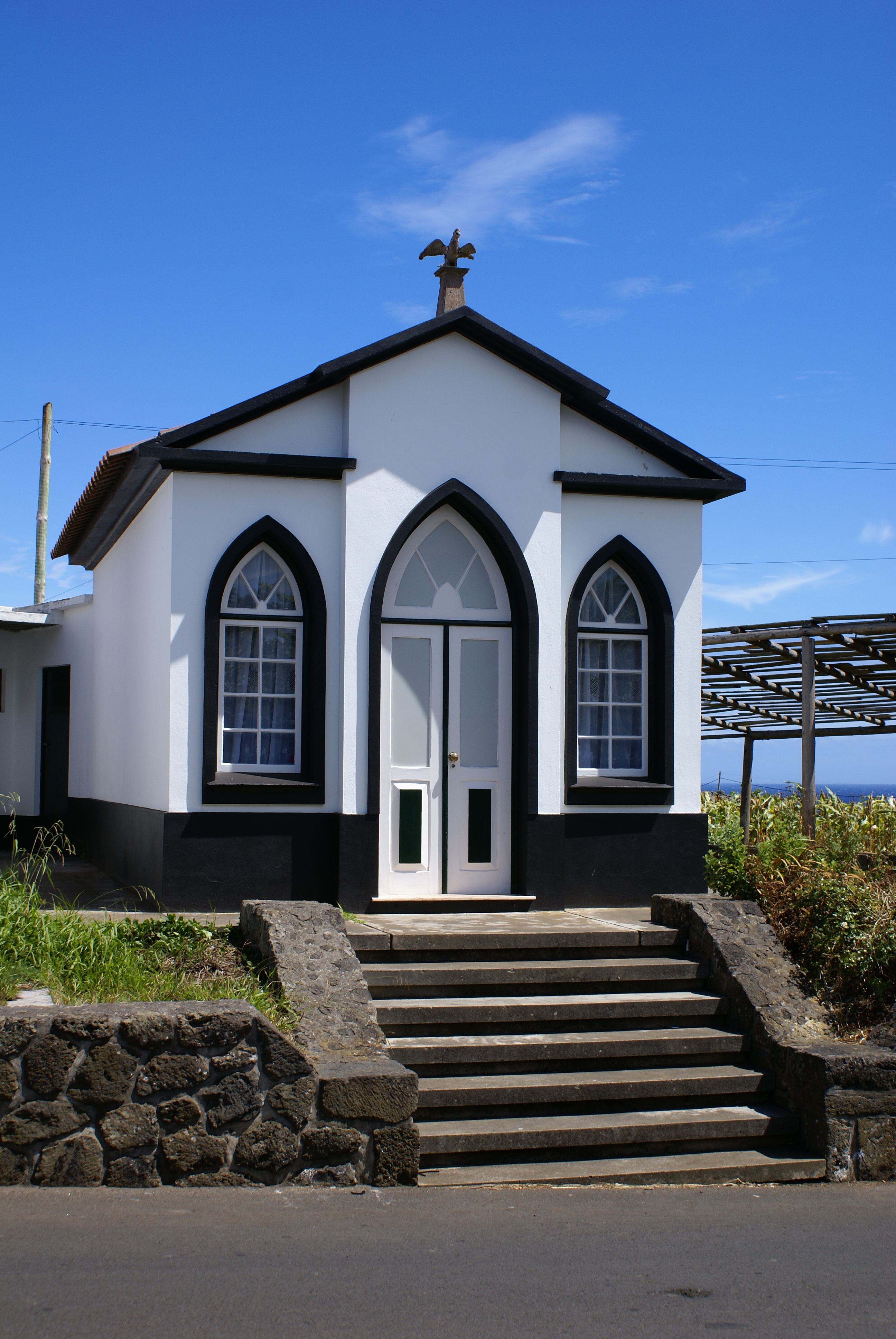 Império do Espírito Santo das Dores, fachada, Dores, Santa Cruz da Graciosa, ilha Graciosa, Açores, Portugal